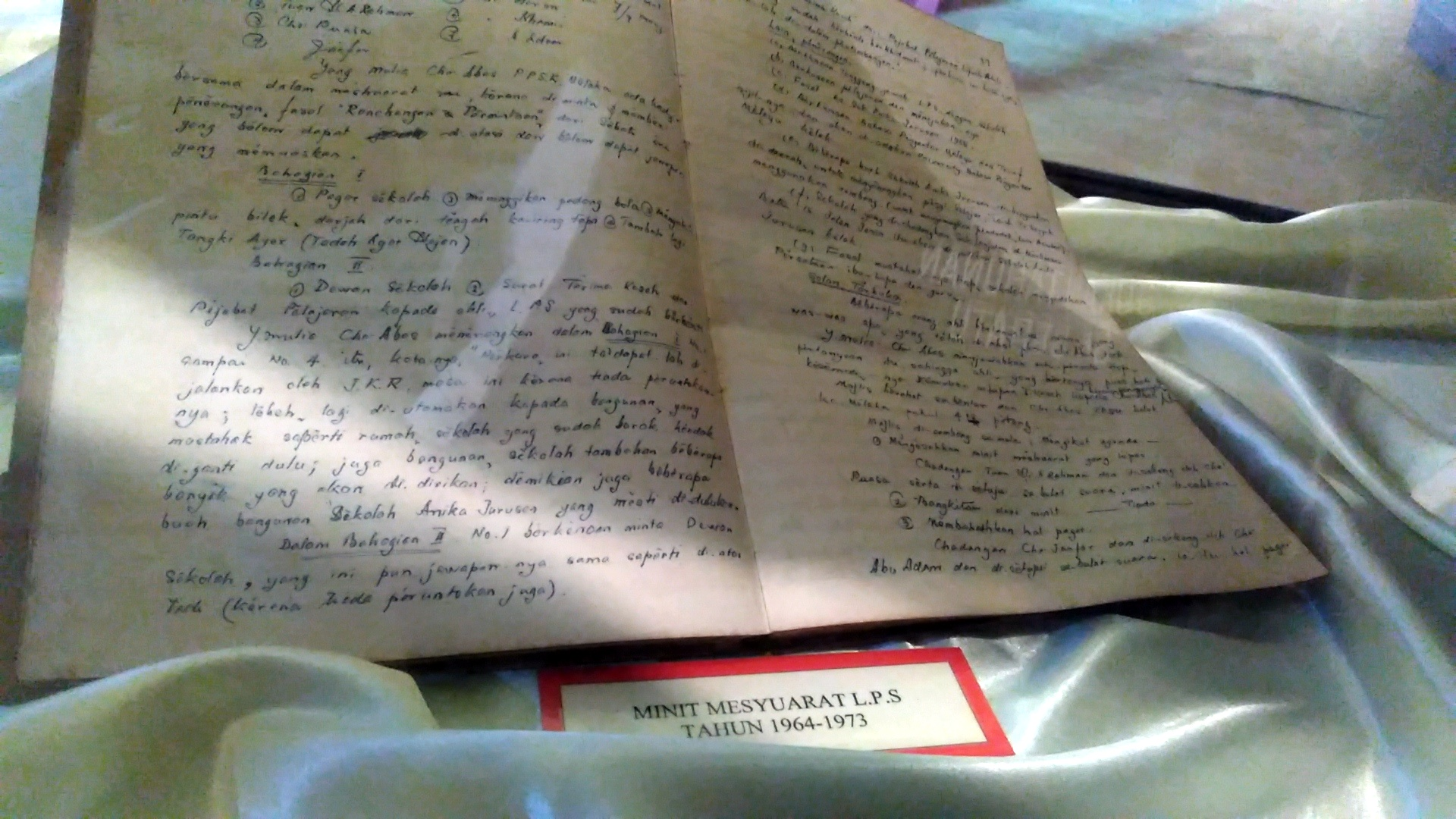 Buku Minit Mesyuarat L.P.S Tahun 1964-1973